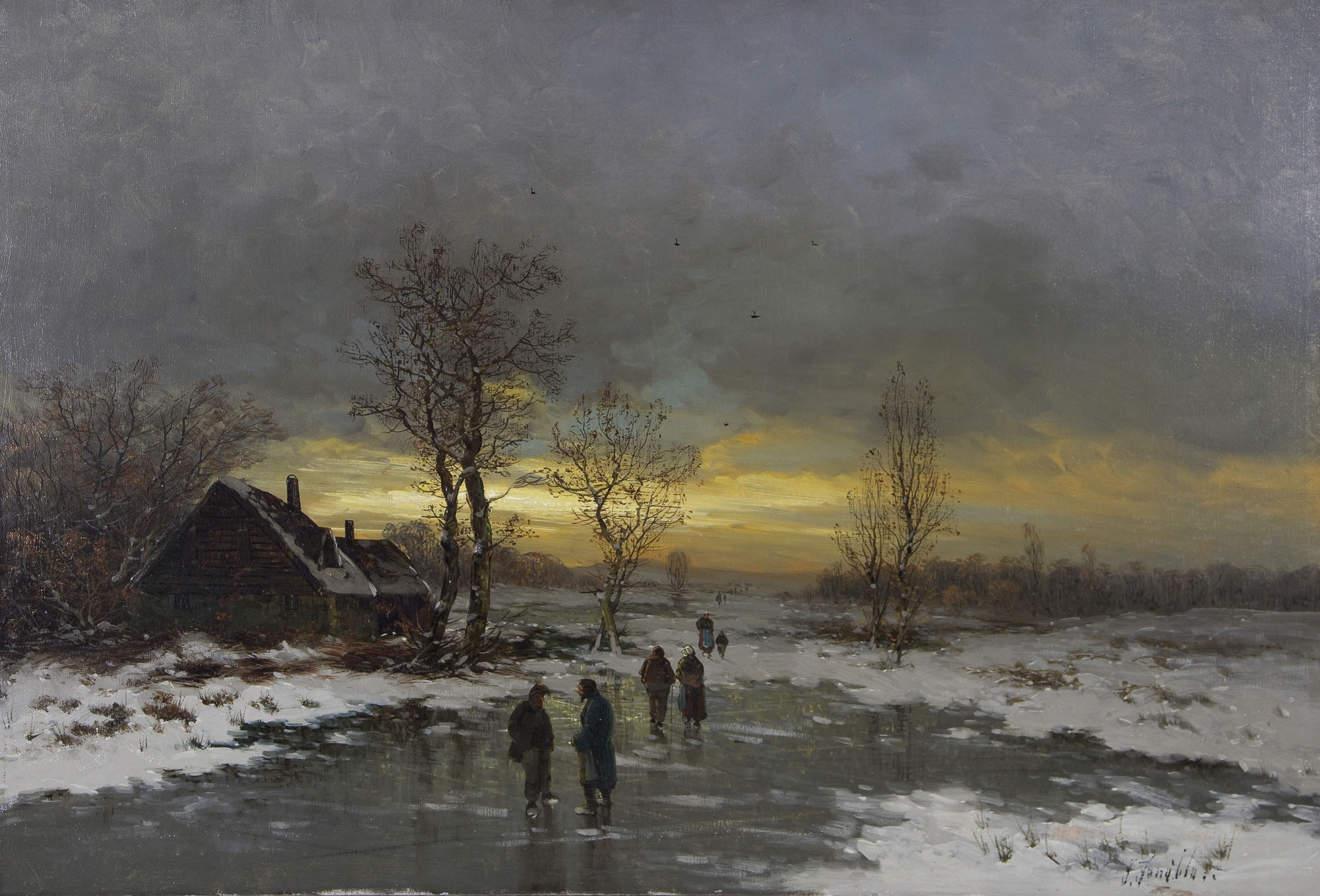 Abendliche Winterlandschaft. Öl auf Leinwand. 64 x 97 cm